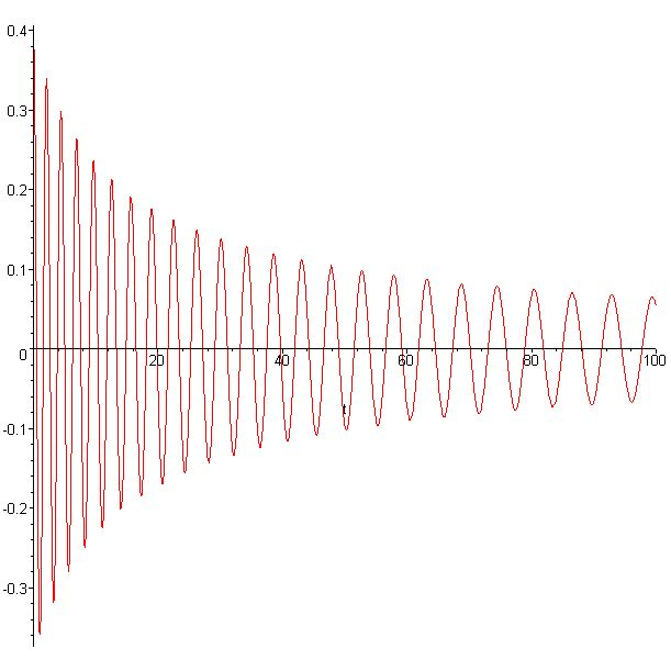 thêta(t) pour le pendule simple de longueur variable linéaire, pendule de Bessel, theta0=Pi/8 rad , thêtapoint0=0 SI, g=9,81 SI, v=0 SI,l0=1m , m=0,1 kg